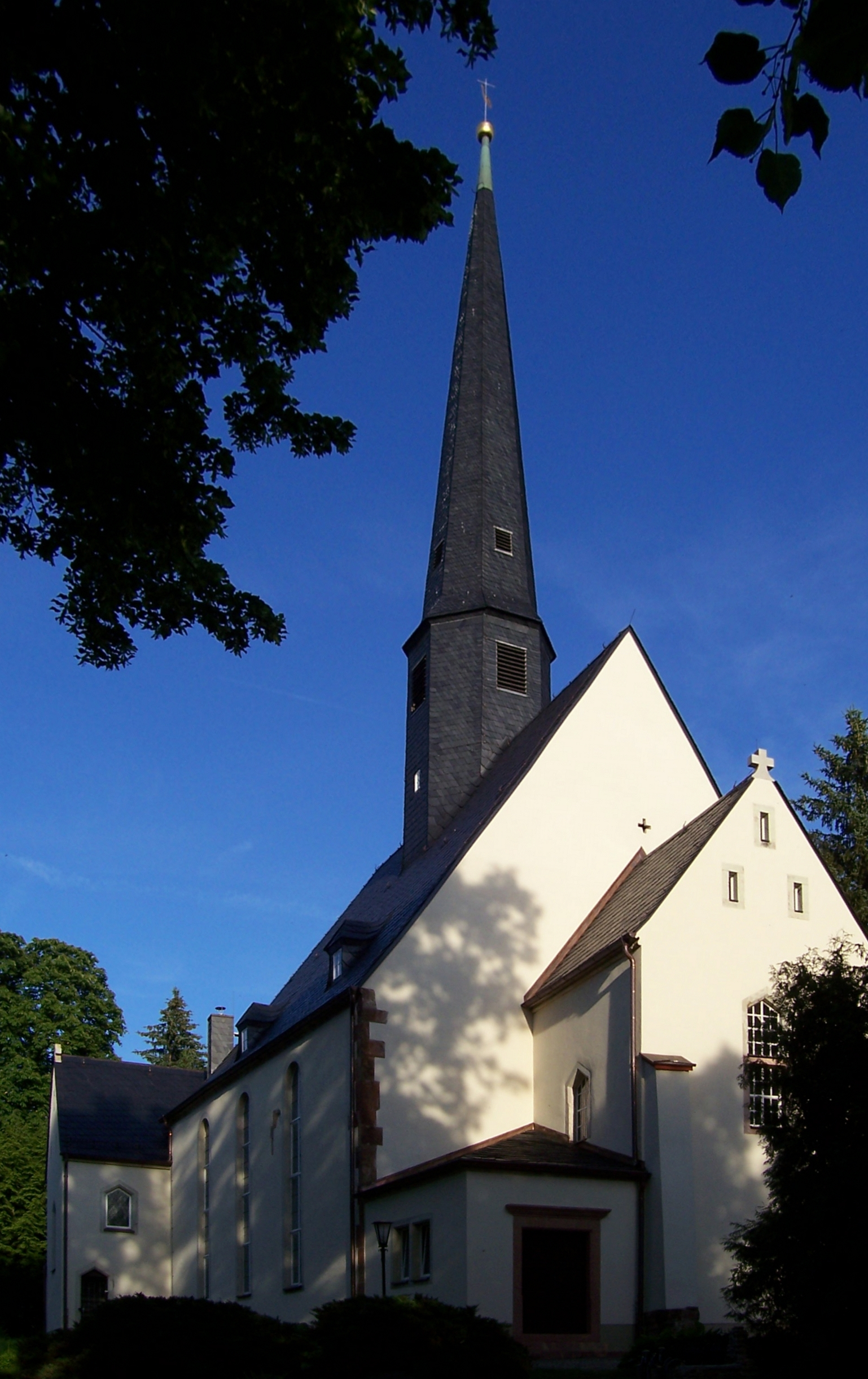 Auerswalde, St. Ursula